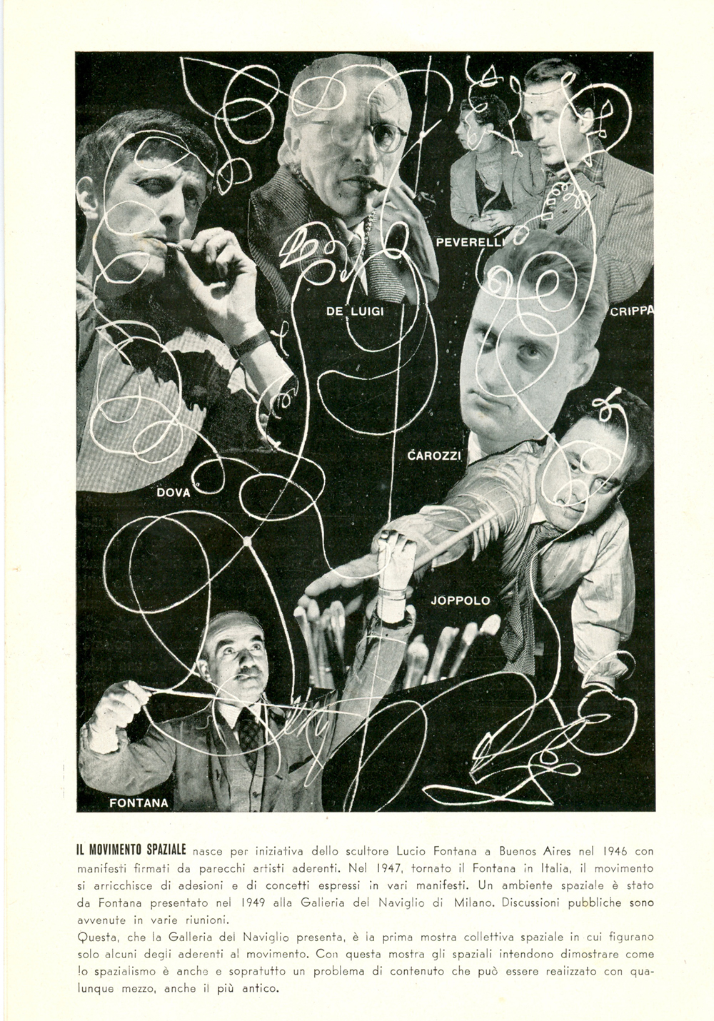 volentino originale Movimento Spazialista